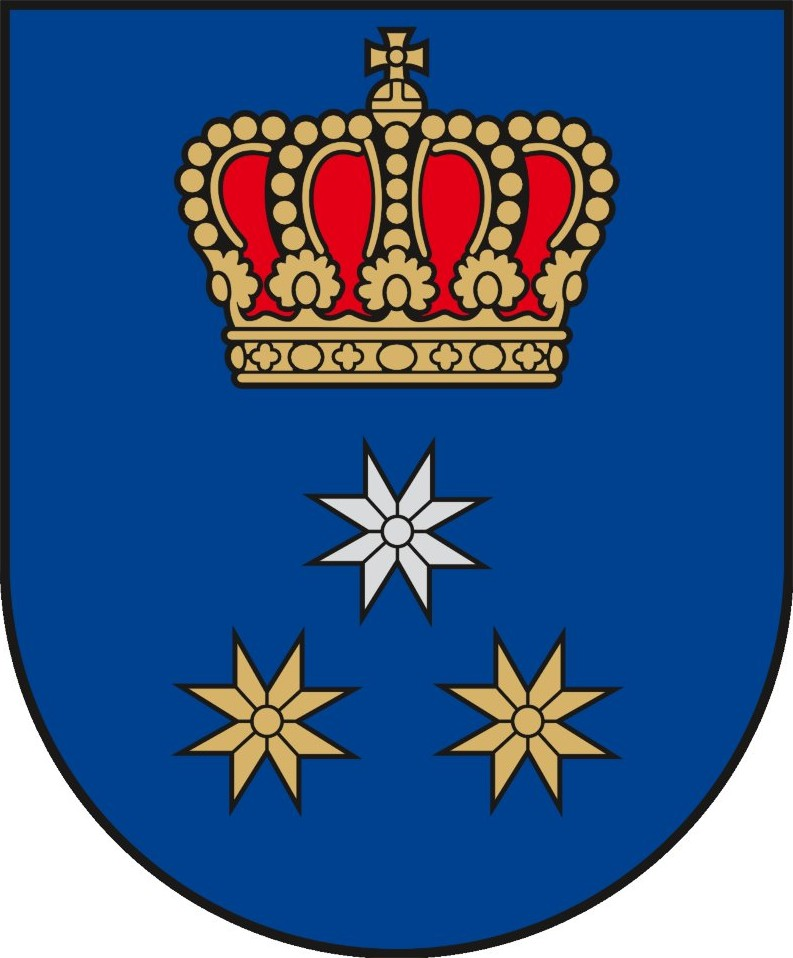 Herb miasta Wieksznie